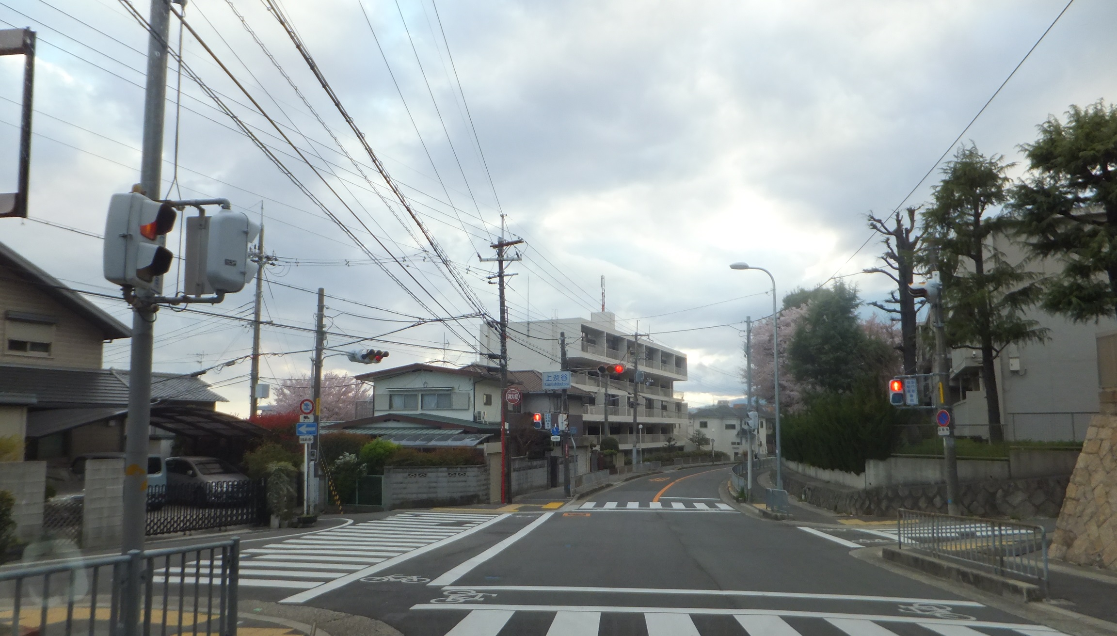 大阪府池田市五月台4丁目 大阪府道9号箕面池田線